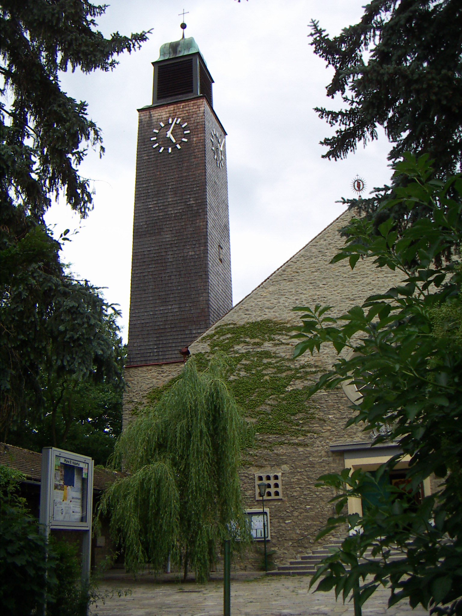 St. Hubertus und Christophorus (Wien), Architekten: Kurt Klaudy, Georg Lippert